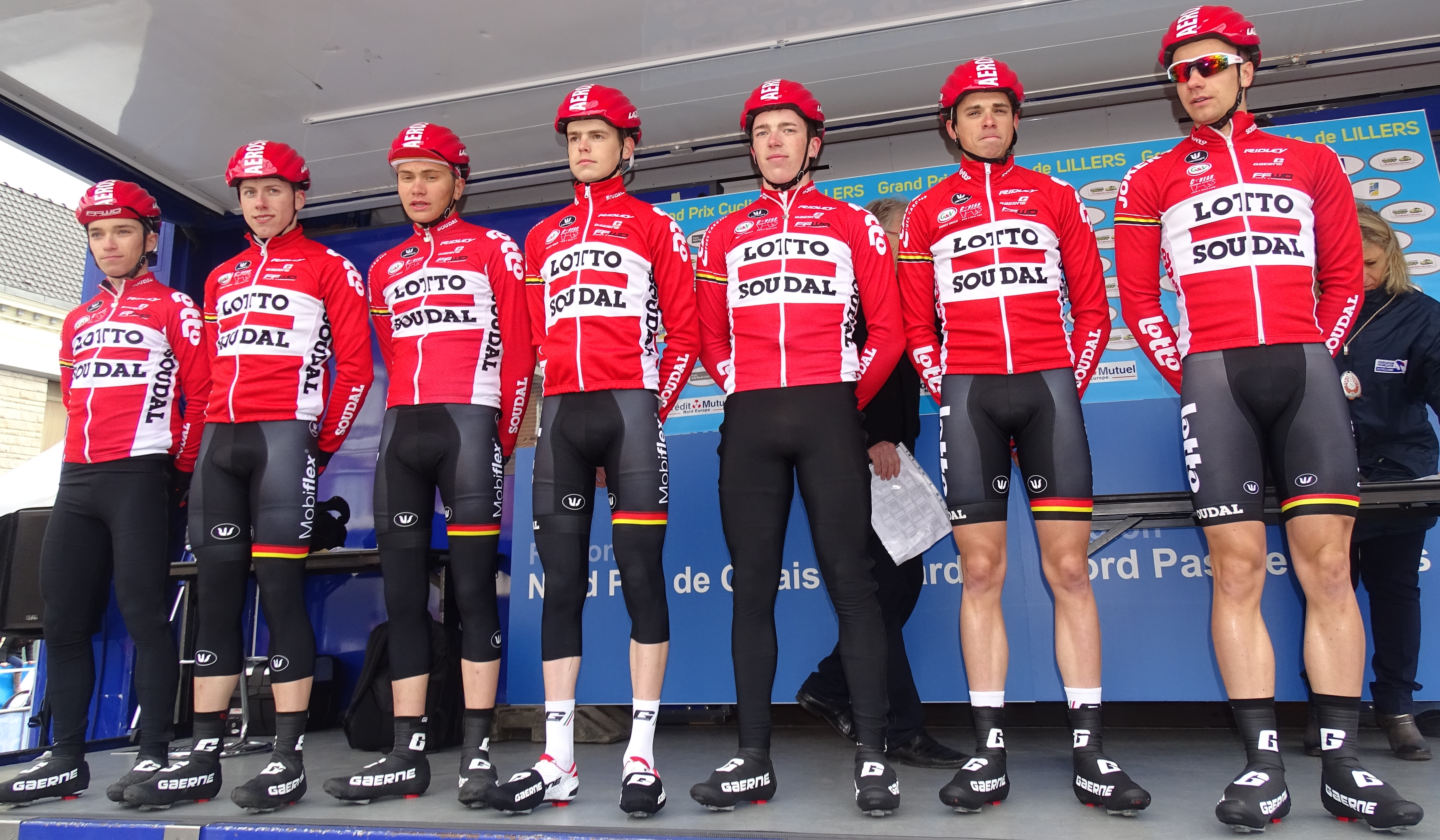 Reportage réalisé le dimanche 6 mars à l'occasion du départ et de l'arrivée du Grand Prix de Lillers-Souvenir Bruno Comini 2016 à Lillers, Pas-de-Calais, Nord-Pas-de-Calais, France.